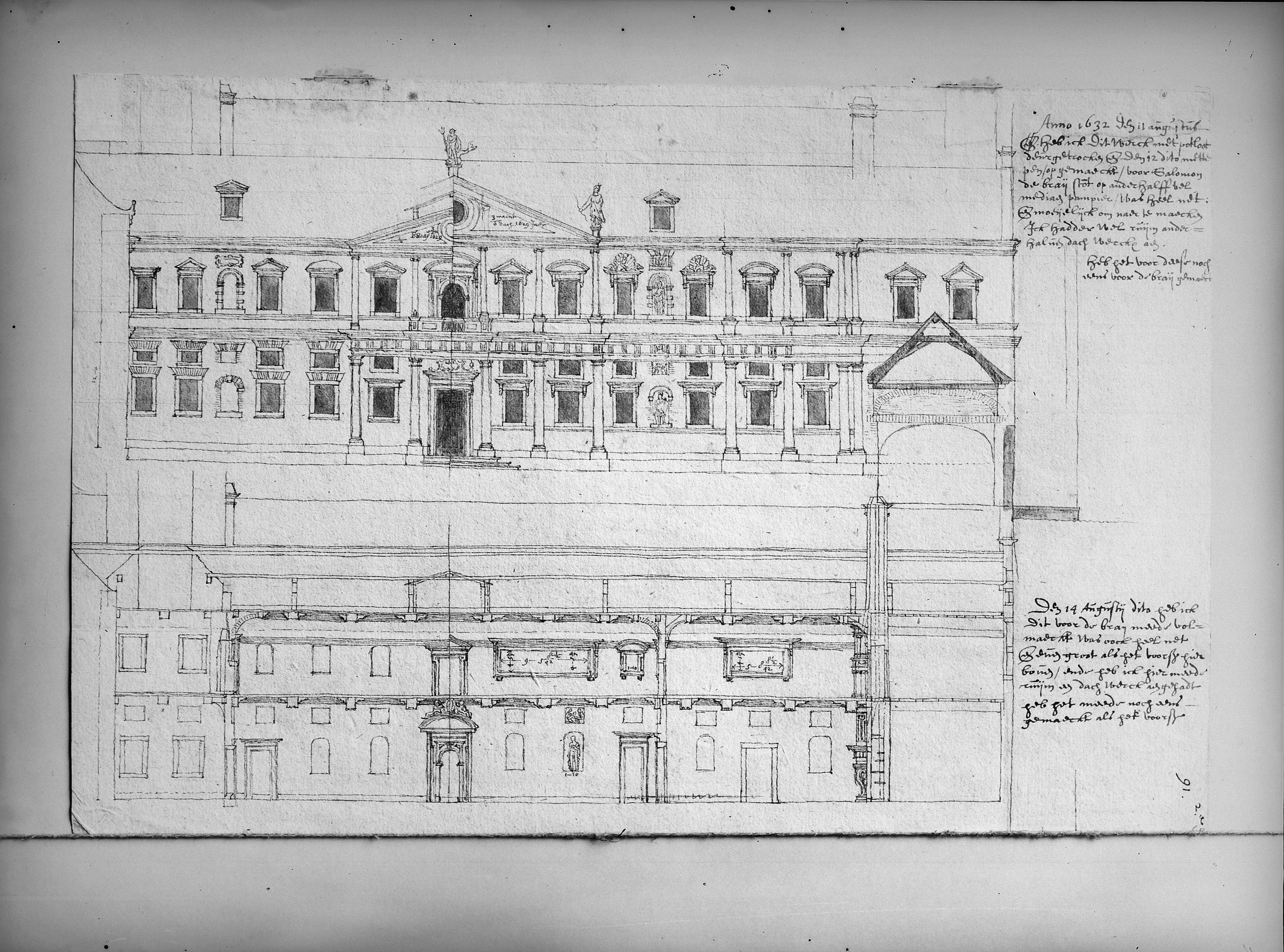 Kasteel Warmond: ontwerp kasteel door De Bray in Archief Haarlem